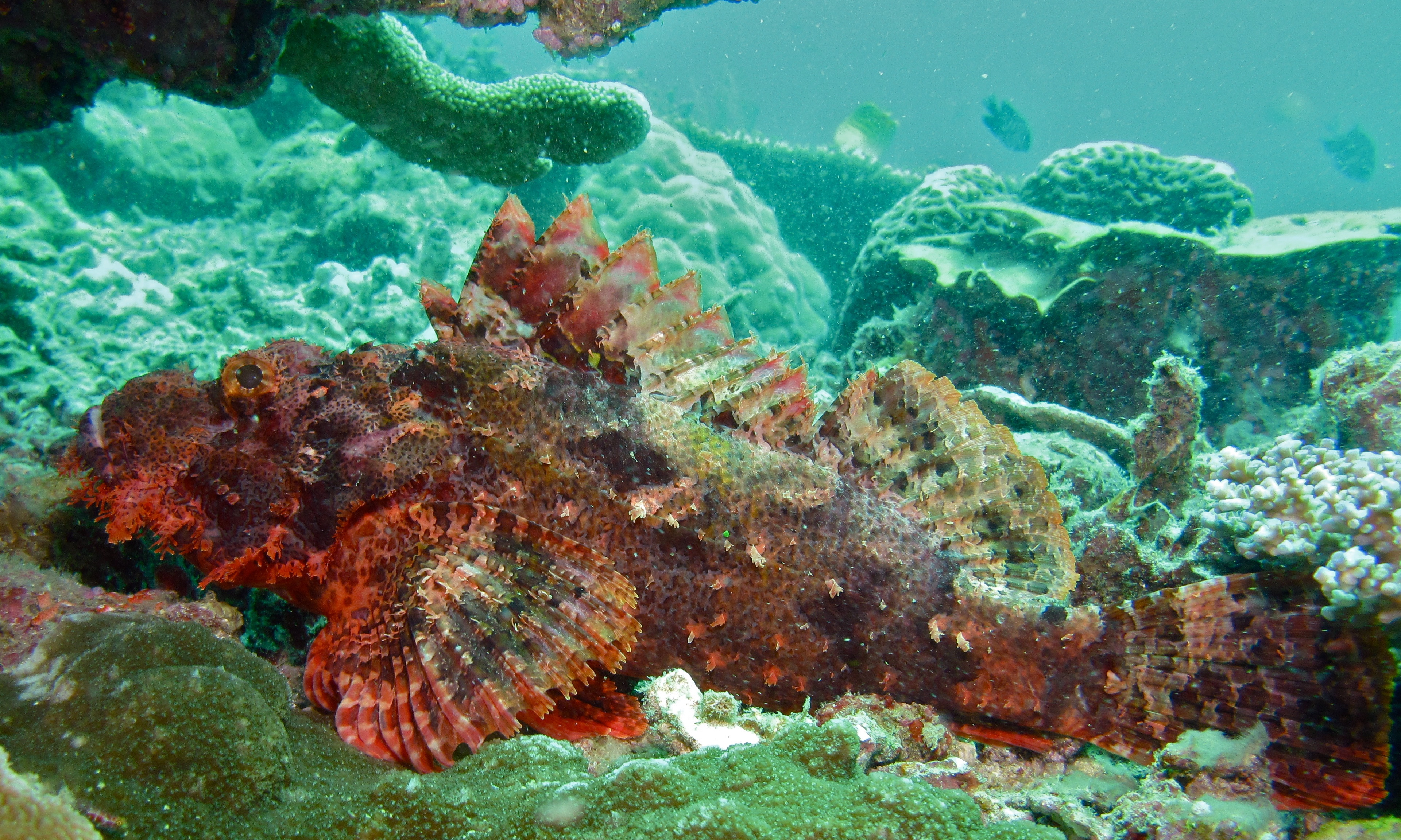 South Point, Pulau Sipadan, Sabah, MALAYSIA